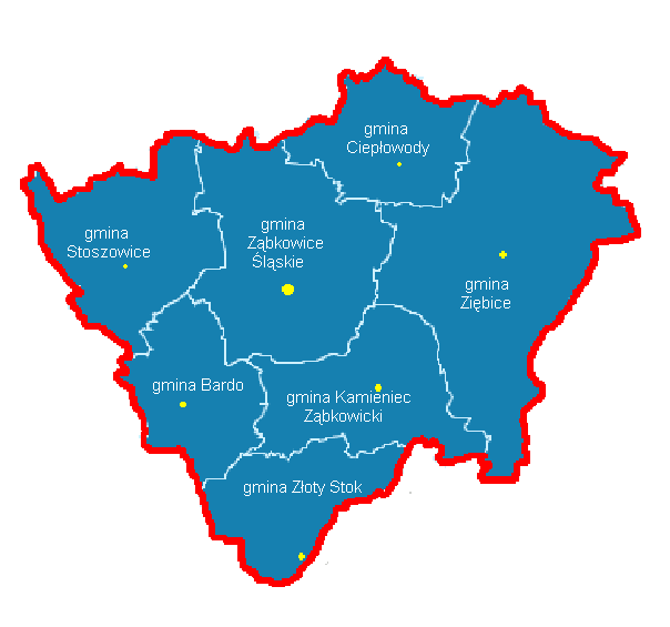 Karte des Landkreis Ząbkowice Śląskie (Frankenstein)